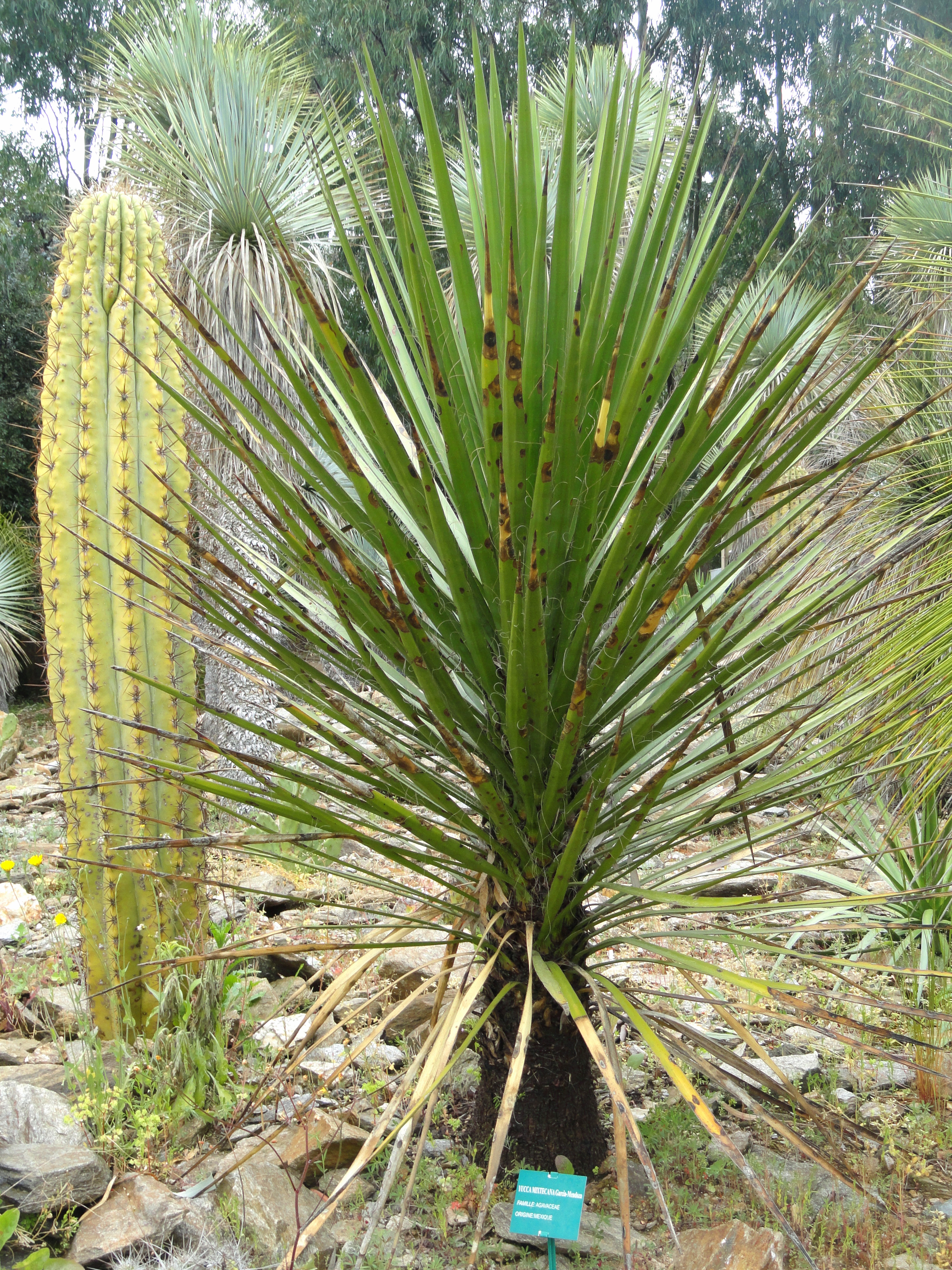 Yucca mixtecana specimen in the Jardin d'oiseaux tropicaux, La Londe-les-Maures, France.